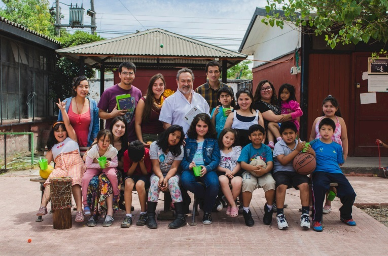 Visita Mario Carvajal a Recrea. Fotografía por Constanza Navarro.